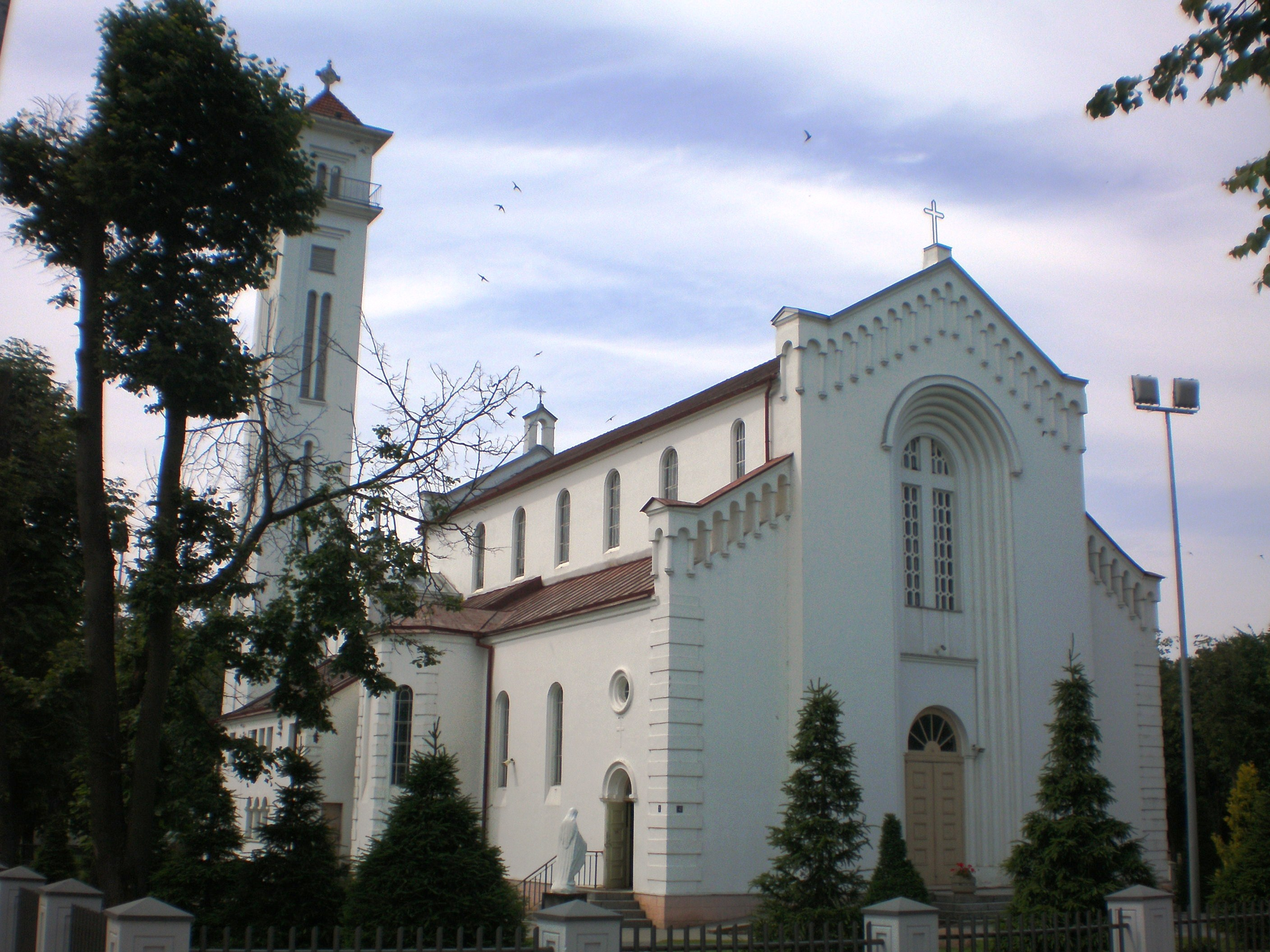 Kybartai (bažnyčia), Vilkaviškio raj.